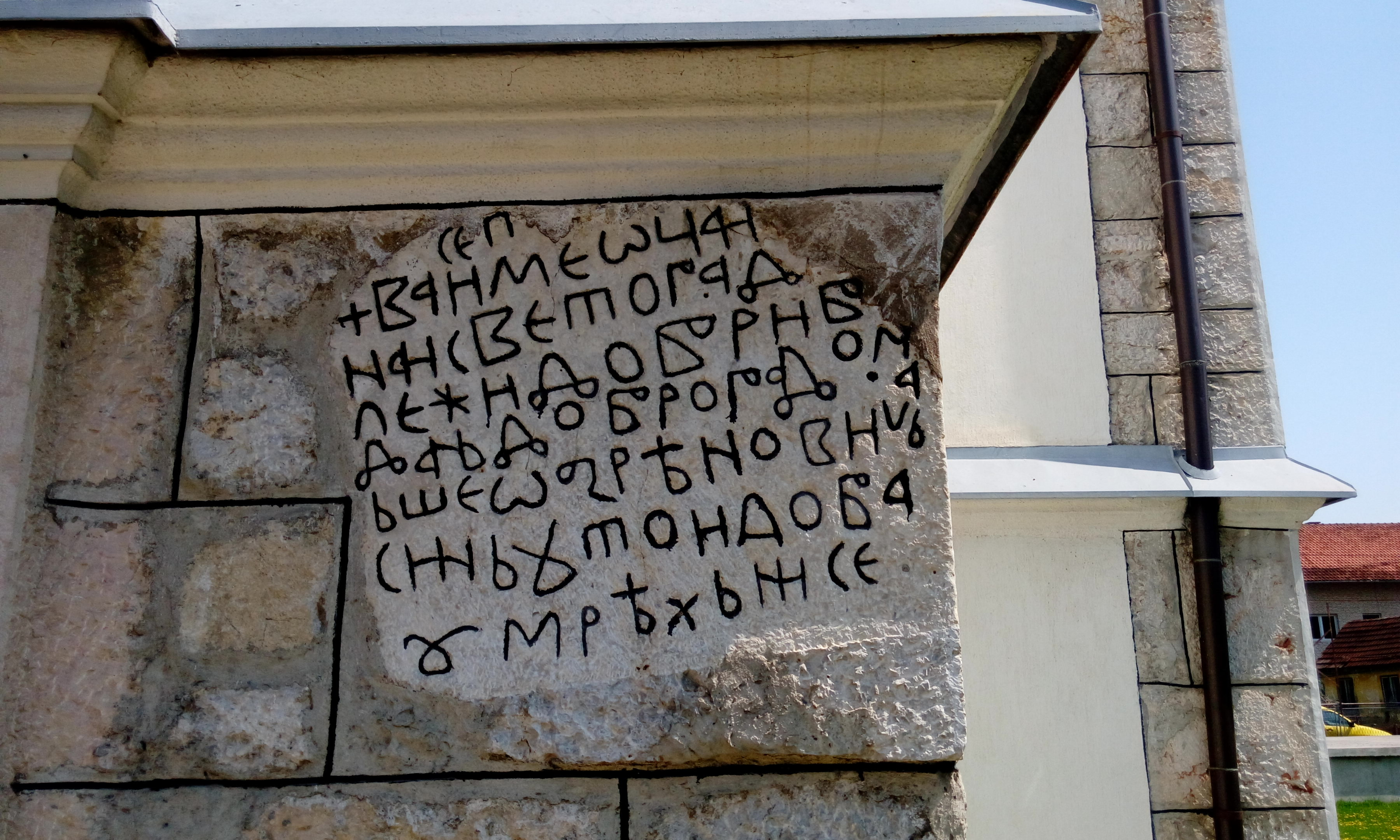 Stecak ugradjen u crkvu